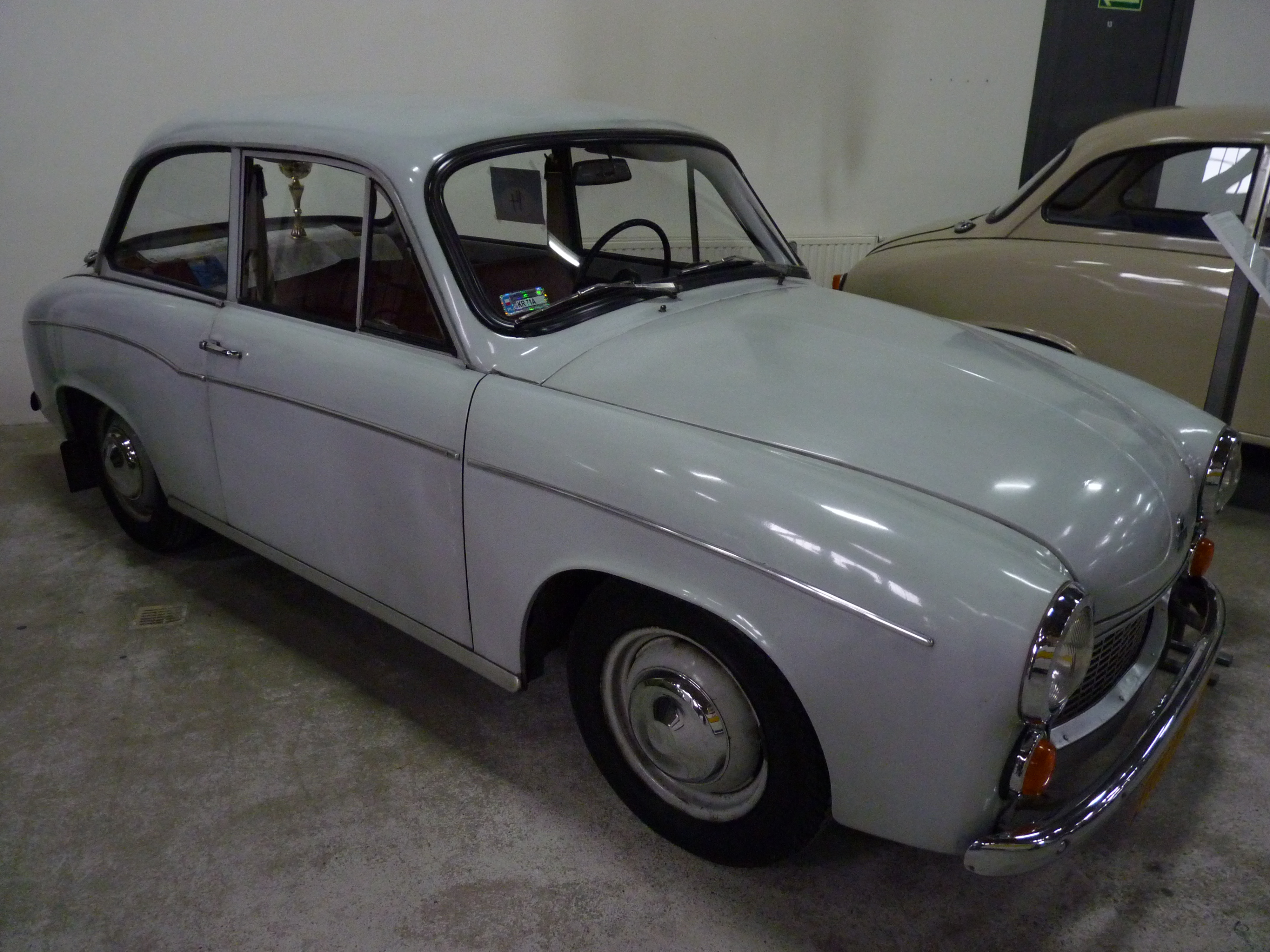 FSM Syrena 105 in Muzeum Inżynierii Miejskiej in Kraków.